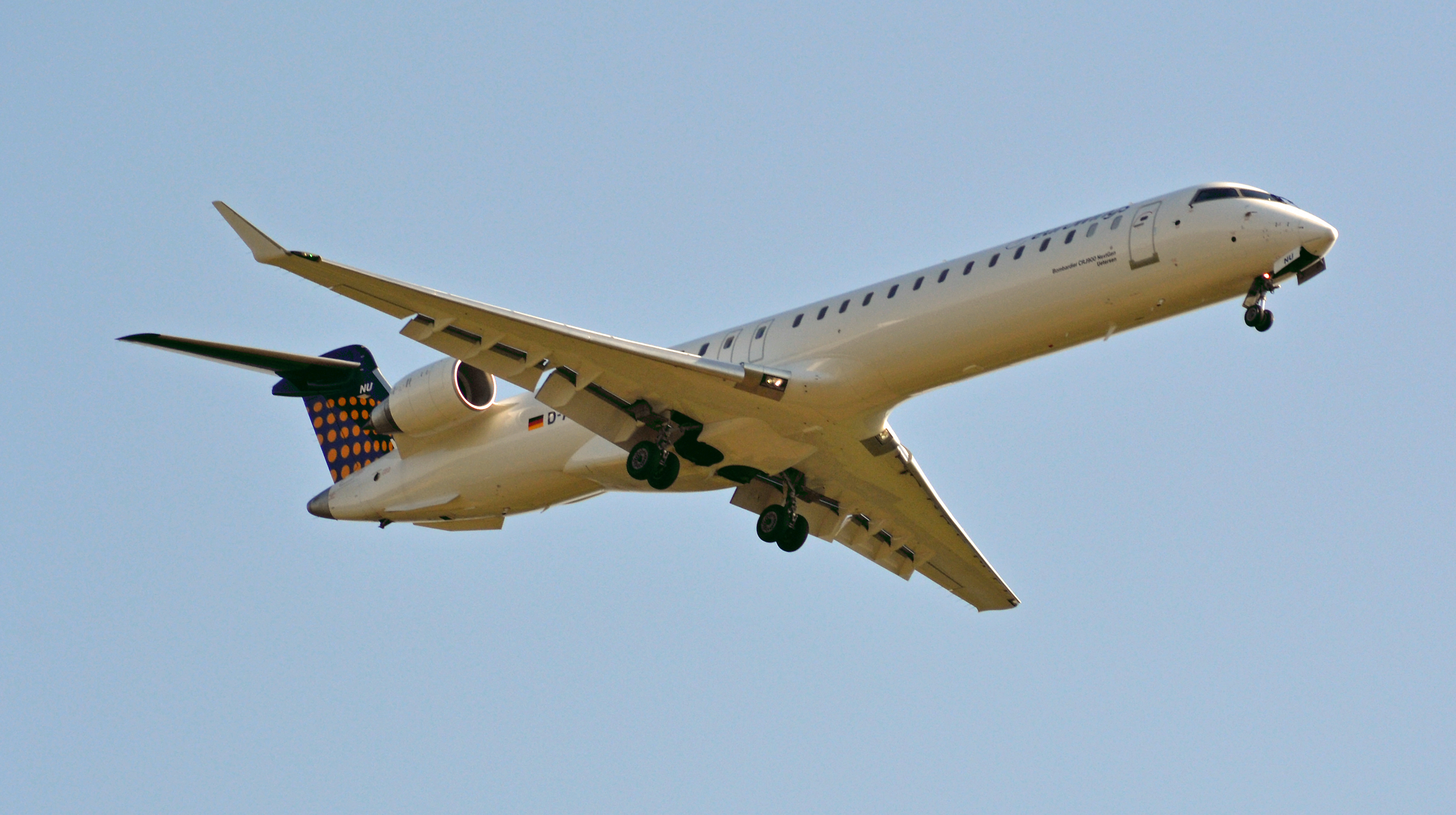 CRJ900 Next Generation Uetersen (D-ACNU)